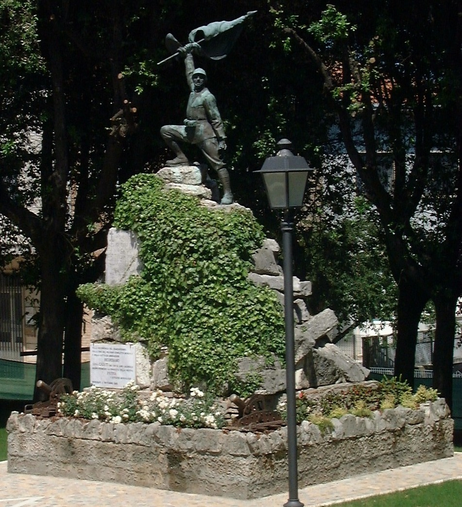 Opera in bronzo eretta nel 1924 su un cumulo di pietre fatte venire appositamente dal Carso.